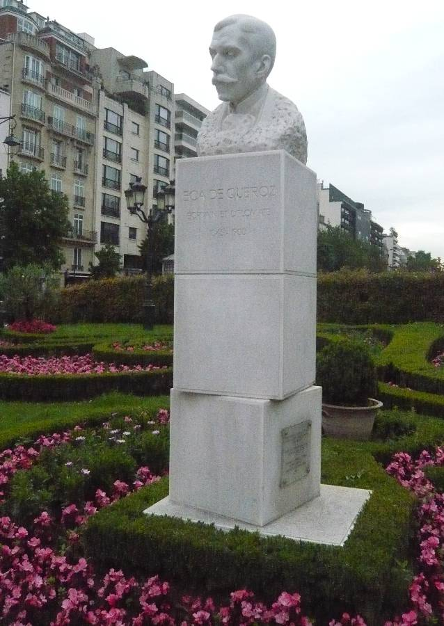 Buste de l'écrivain et diplomate portugais Eça de Queiroz (1849-1900) avenue Charles de Gaulle (terre plein) - Neuilly-sur-Seine